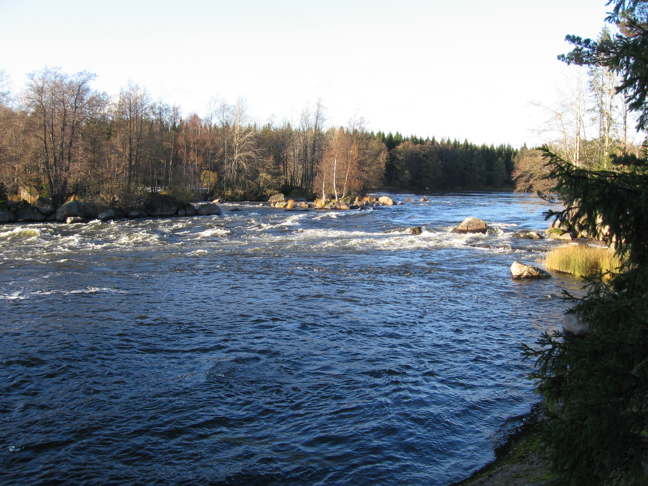 Ahvionkoski Kymijoessa.